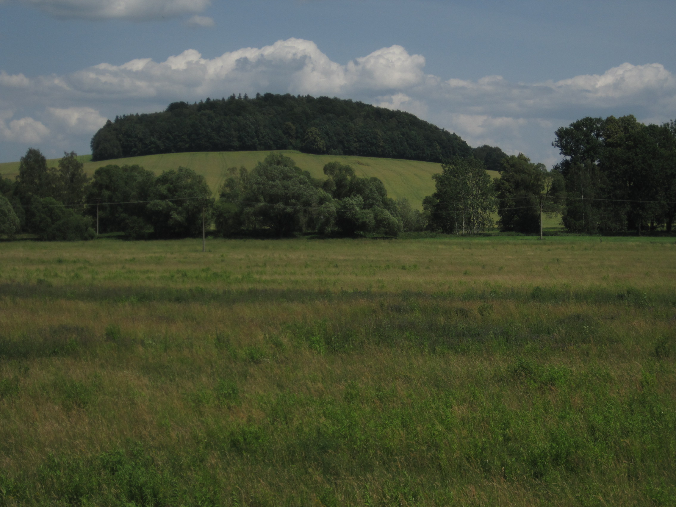 Hradec (Astberg, 313 m) u Předlánců od višňovského nádraží